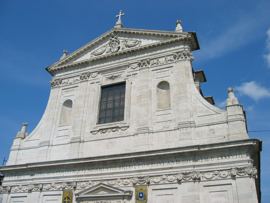 Chiesa di San Girolamo degli Schiavoni, Roma.